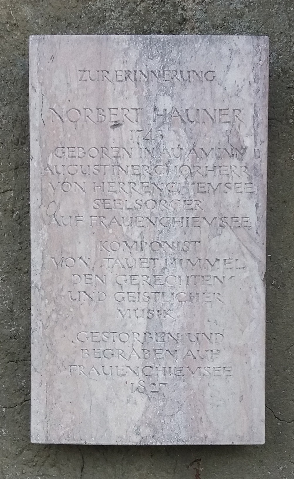 Gedenkstein für Norbert Hauner, Inselfriedhof Frauenchiemsee